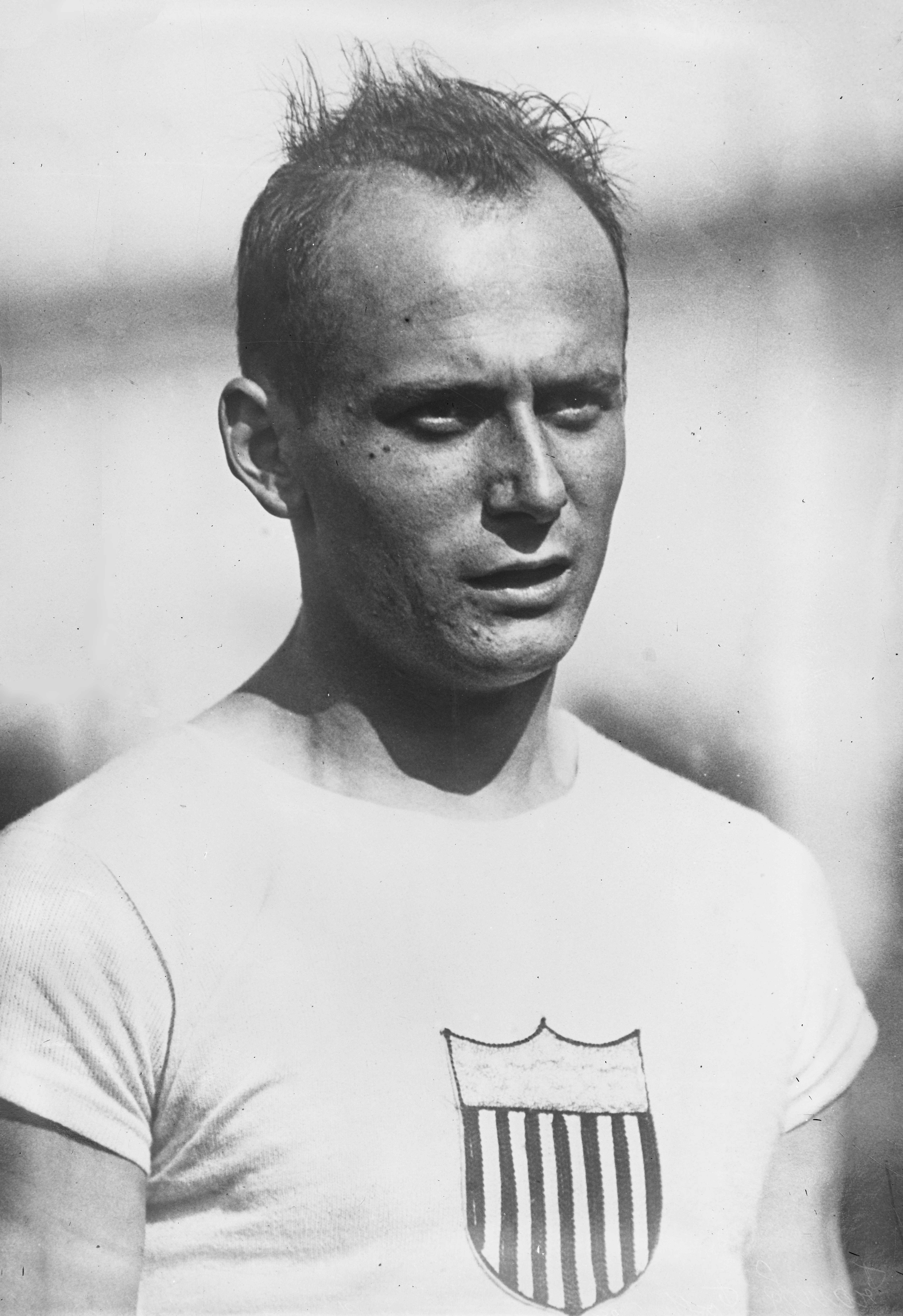 Frank Foss, record du monde de saut à la perche [Jeux olympiques d'Anvers, 20/8/20].